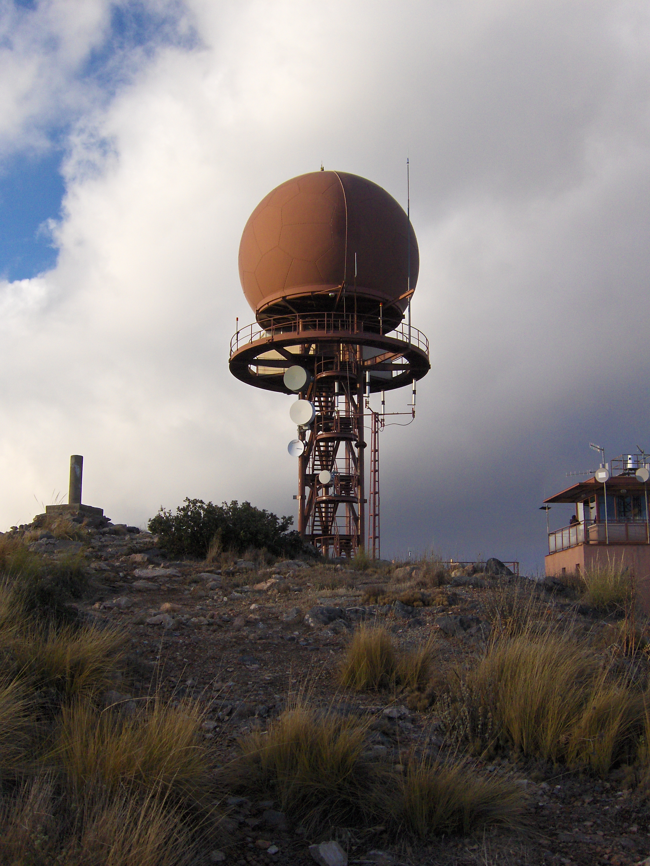 Vista de la estación de radar del Pico Colativí bajo las nubes